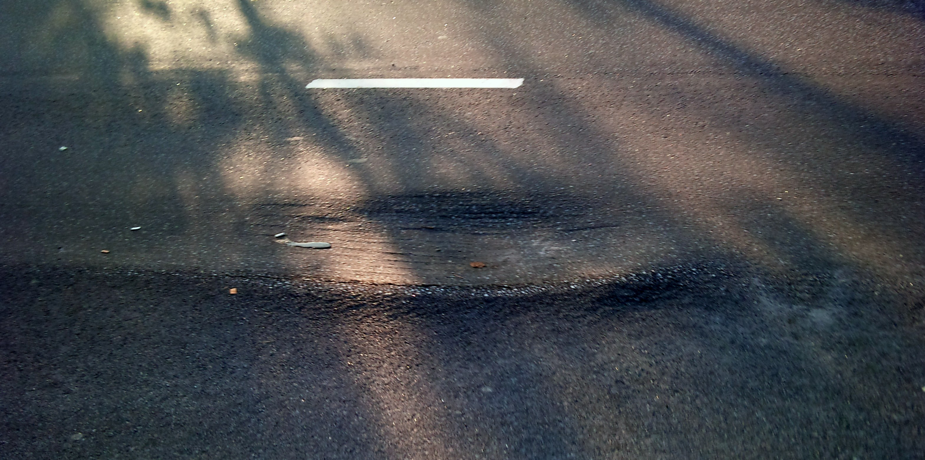 Asfalt som smält av värme